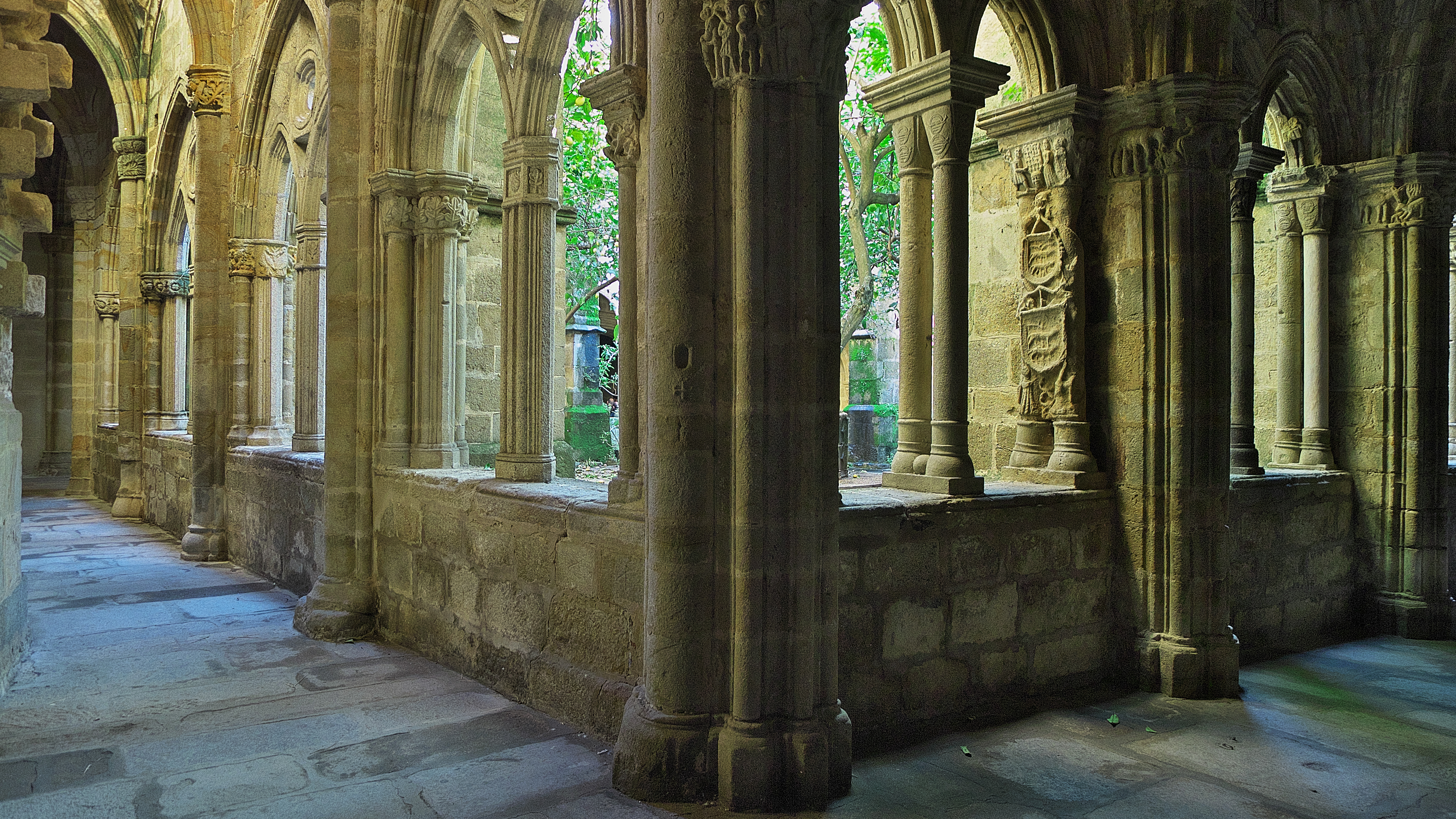 Interesante claustro tardorrománico. Se observa en los capiteles, principalmente, la herencia románica.